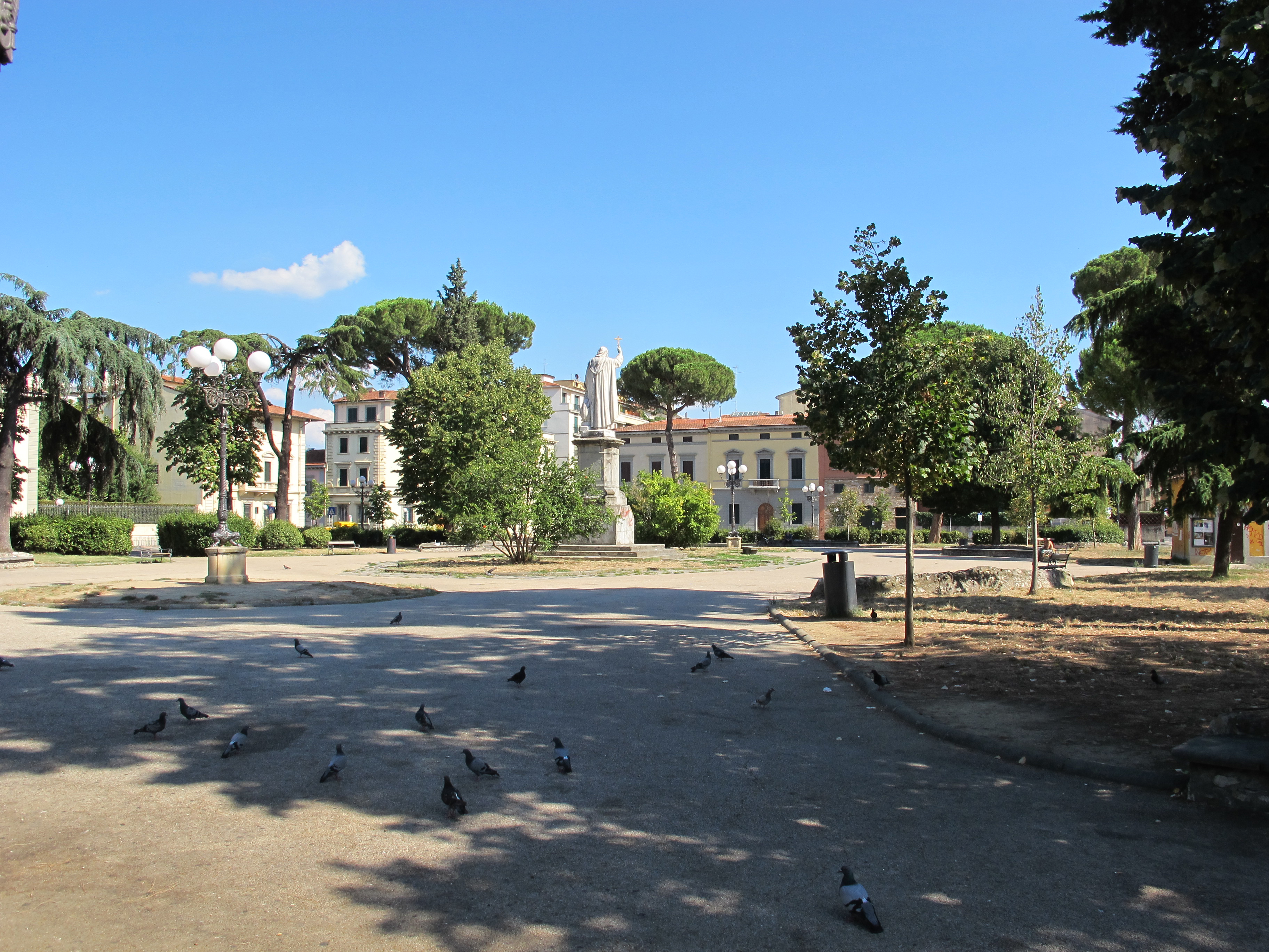 Piazza Savonarola (Florence)